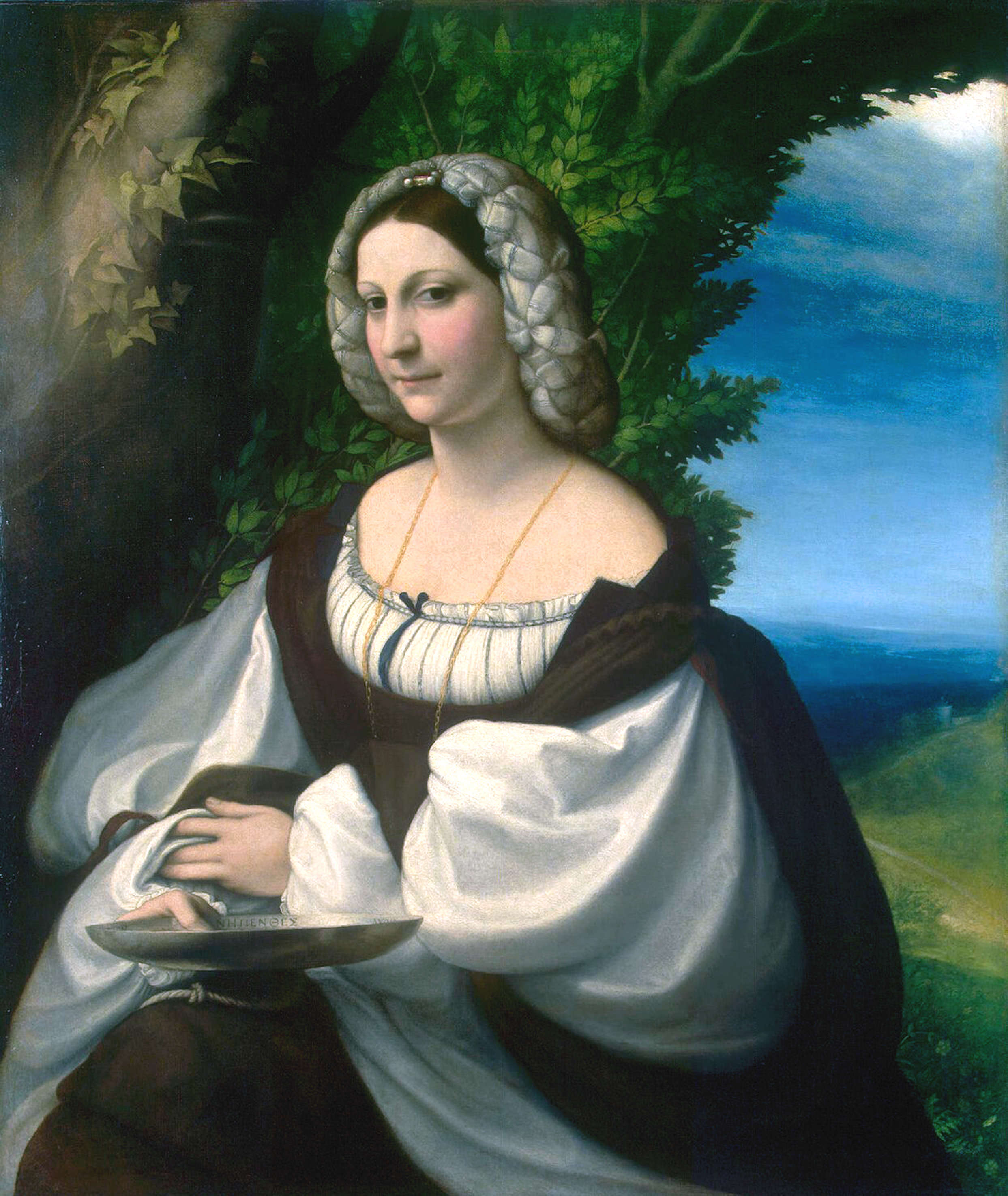 Ritratto di dama, Olio su tela, 102 x 86 San Pietroburgo, Hermitage Il secondo periodo della vita del Correggio si apre con l’esecuzione, tra il 1517 e il 1520, di un’opera di elevata raffinatezza stilistica ma alquanto enigmatica: il Ritratto di dama (variamente identificata in Veronica Gambara o Ginevra Rangoni), firmato con la colta latinizzazione del suo nome: Anton(ius) Laet (us)